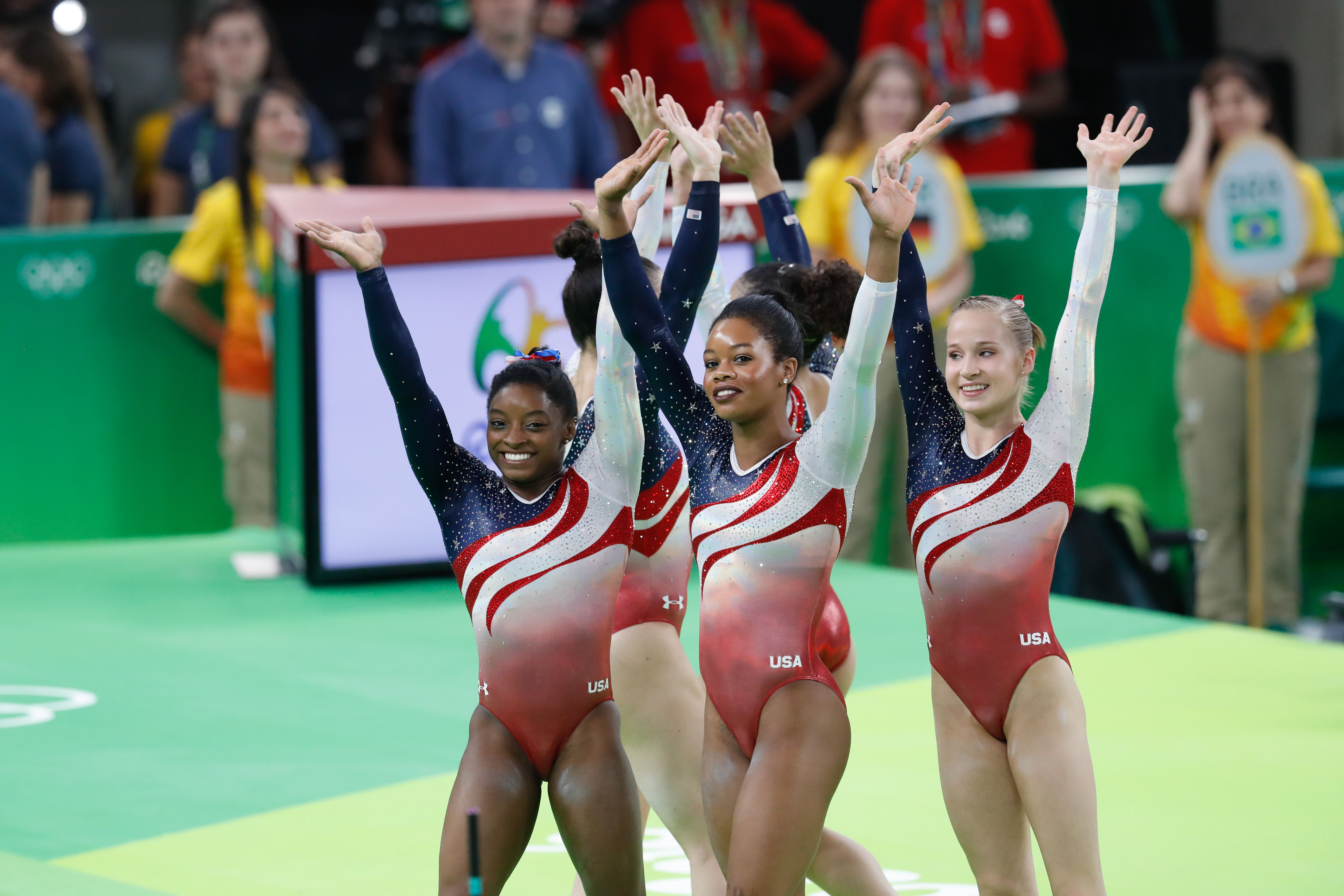 Rio de Janeiro - Ginastas dos Estados Unidos comemoram medalha de ouro na disputa por equipes feminina nos Jogos Olímpicos Rio 2016. (Fernando Frazão/Agência Brasil)